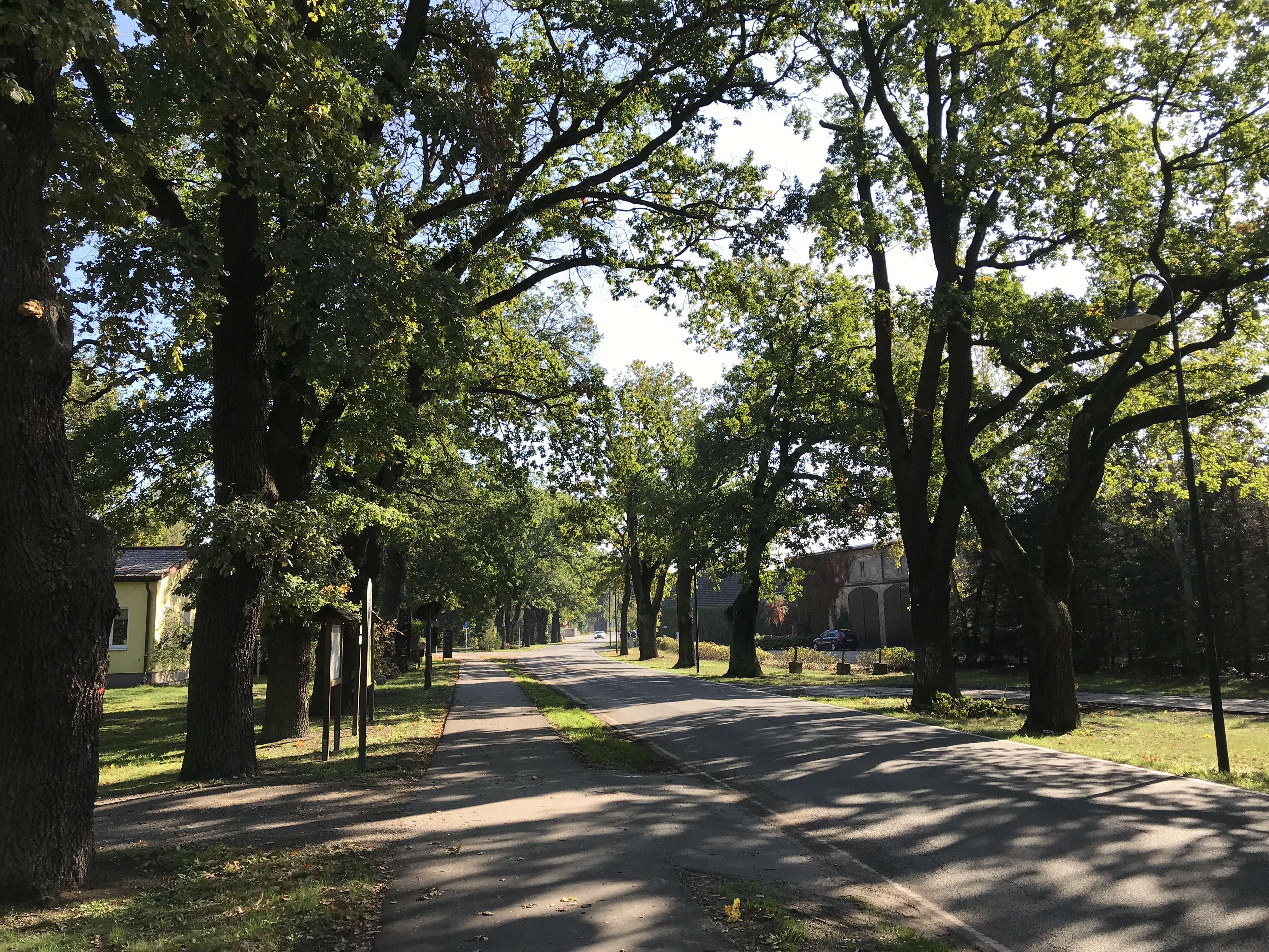 Holbeck, ein Ortsteil der Gemeinde Nuthe-Urstromtal in Brandenburg